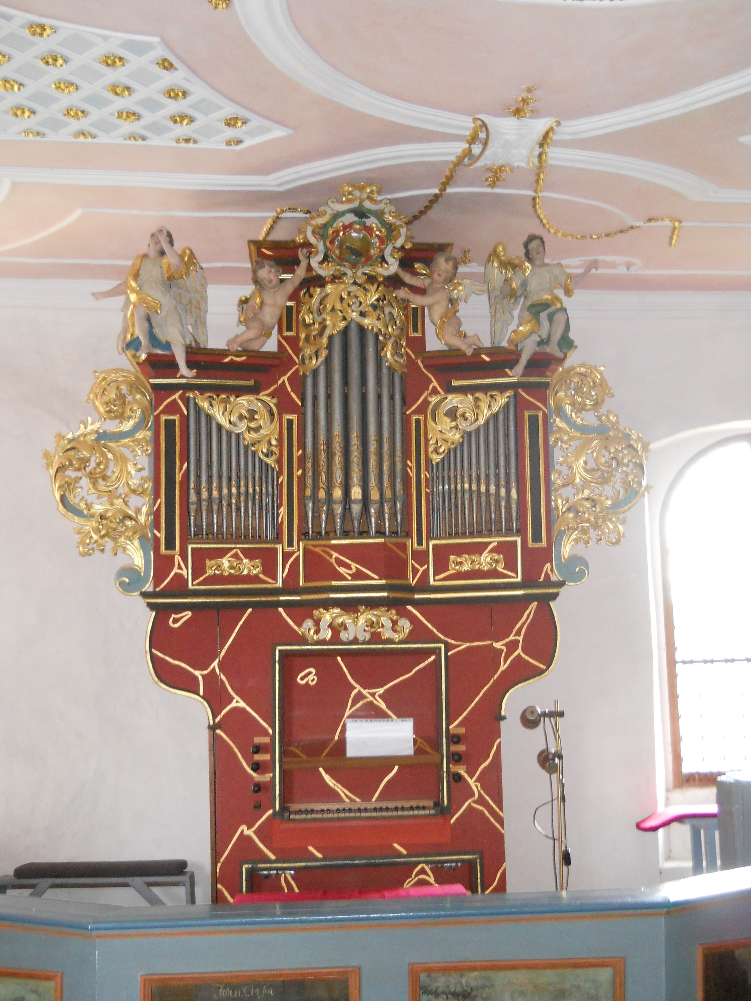 Klausstein-Kapelle bei Ahorntal in der Fränkischen Schweiz, Orgel